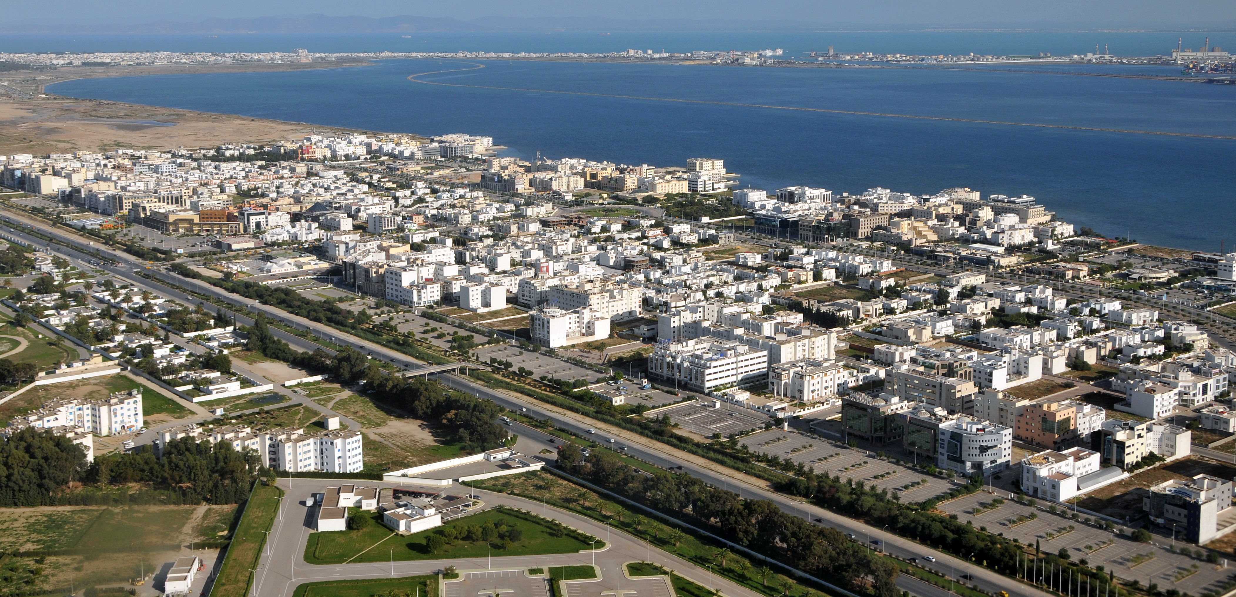 Vue aérienne de la cité du lac de Tunis.